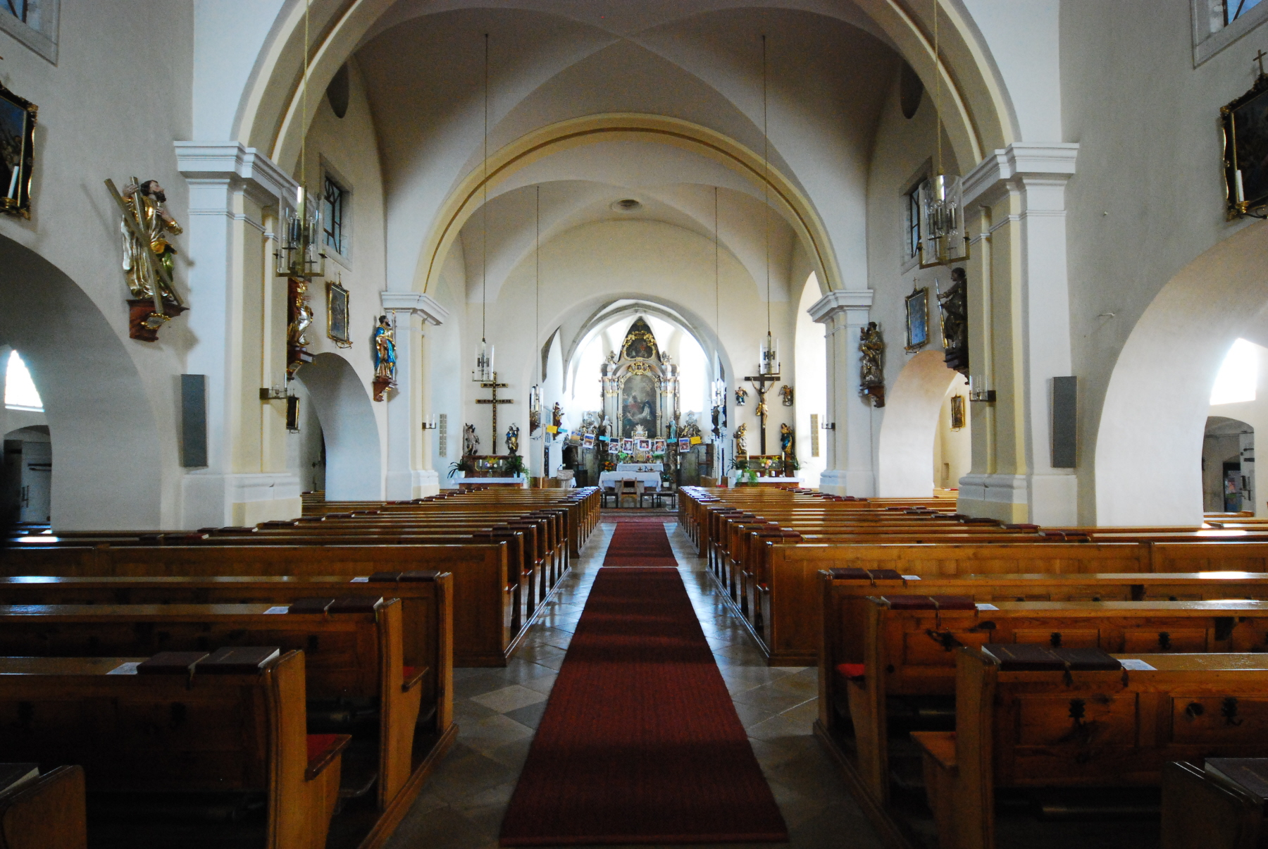 Kath. Pfarrkirche hl. Martin und Friedhof